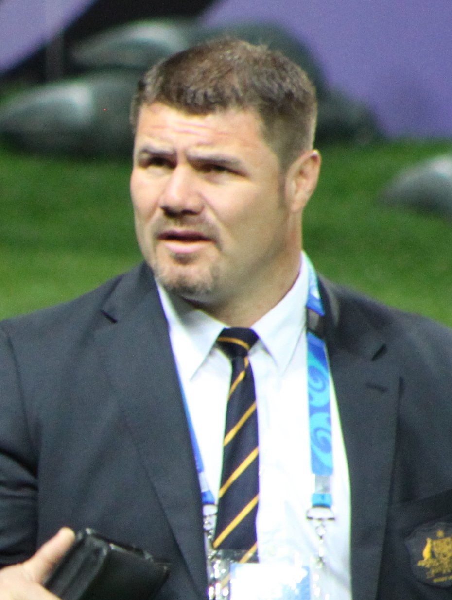 AUSSIE_USA_047